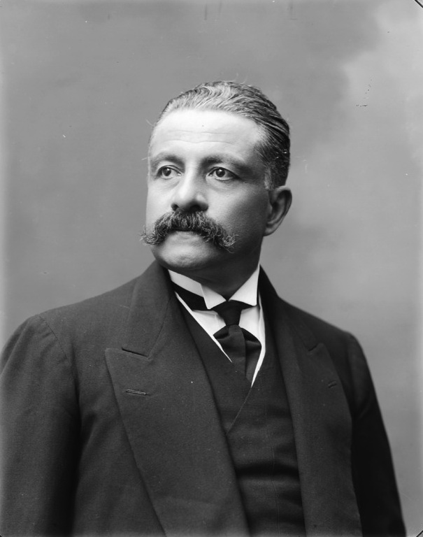 Politico Francesco Sangiorgi